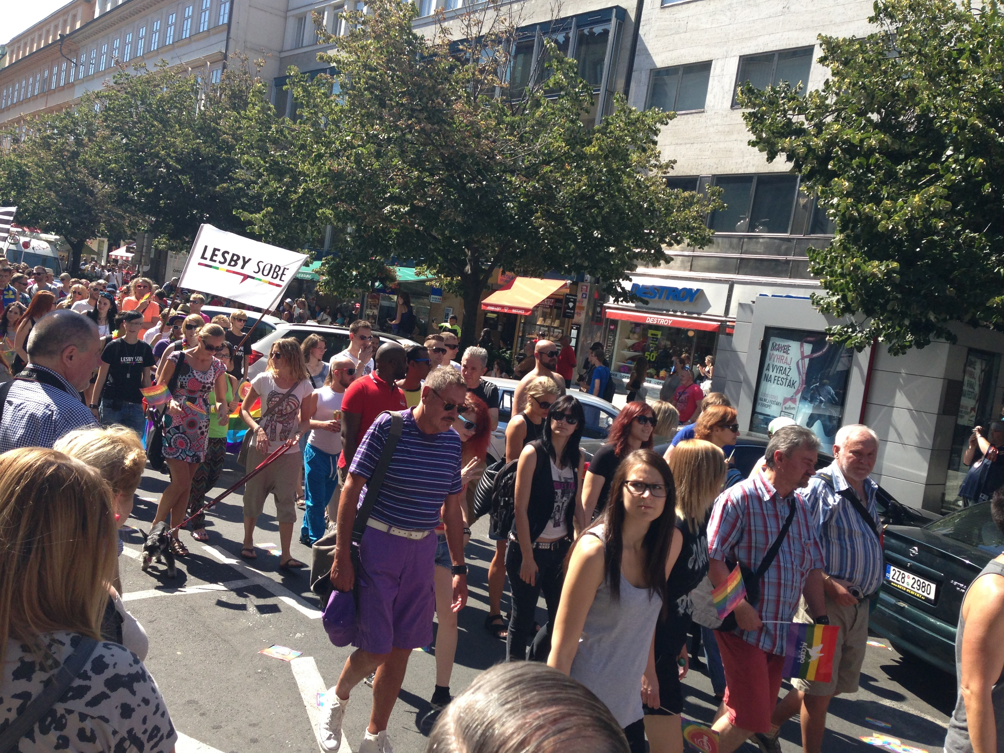 Prague pride 2013, Na příkopě street.